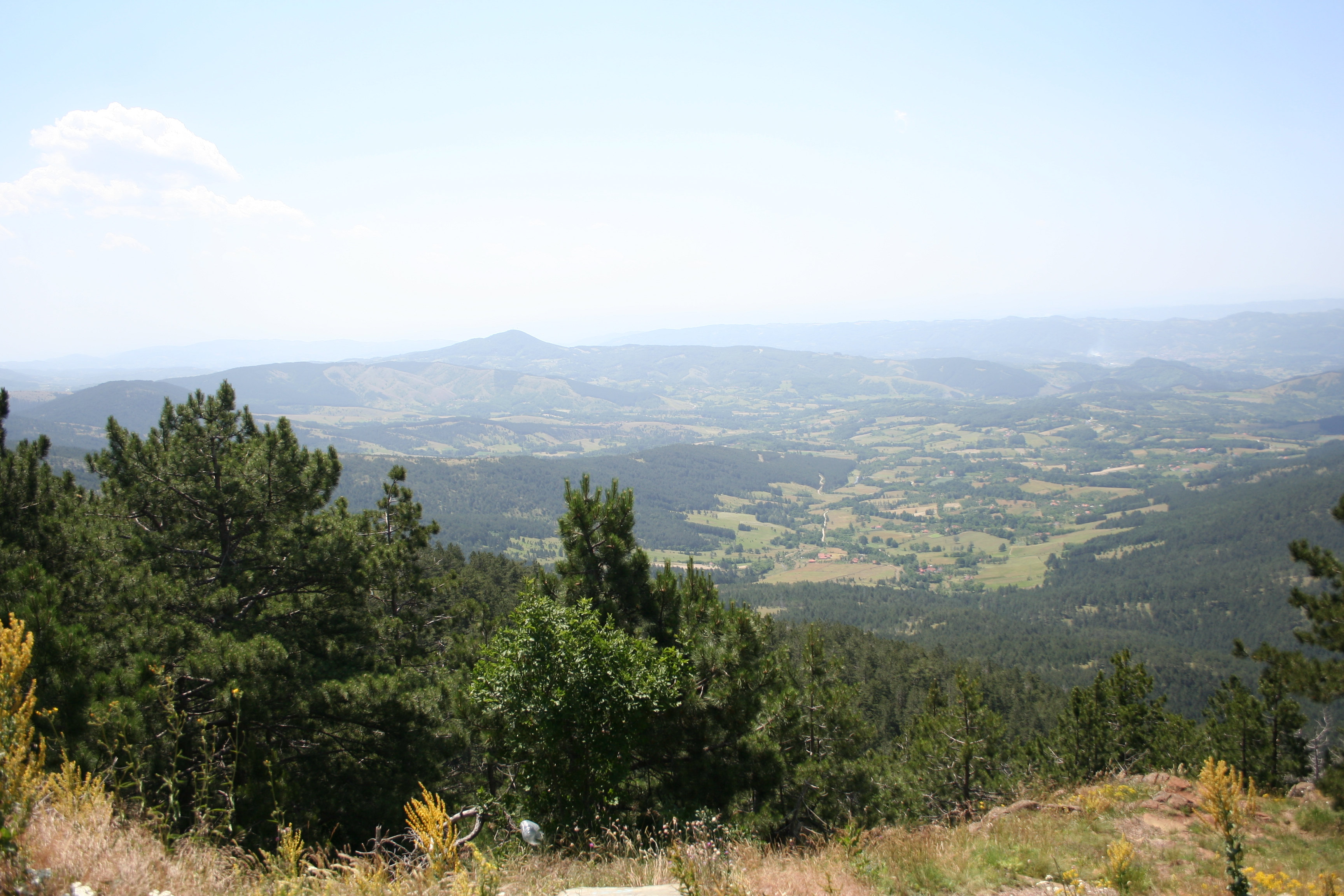 Divčibare